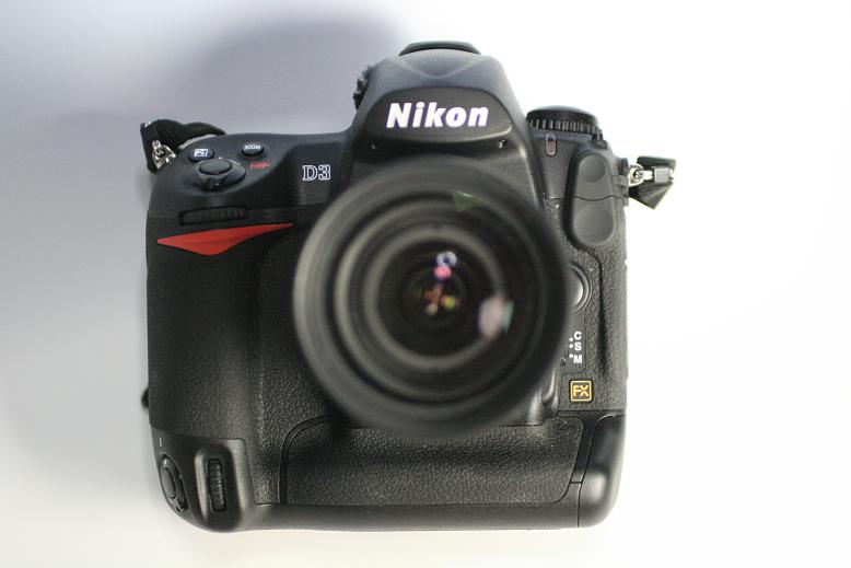 NIKON D3